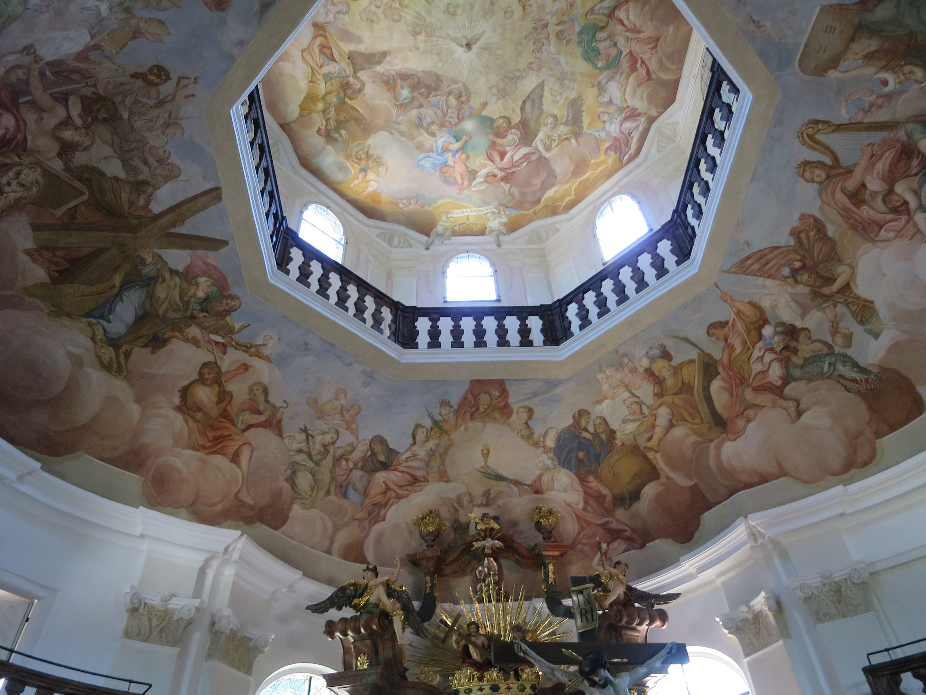 Zentralbau mit drei Konchen und Vorhalle, Flankentürme und zentrale Kuppel mit Glockenhauben, 1705/07; mit Ausstattung, Blick in die Kuppel der Katholischen Wallfahrtskirche Unsere Liebe Frau